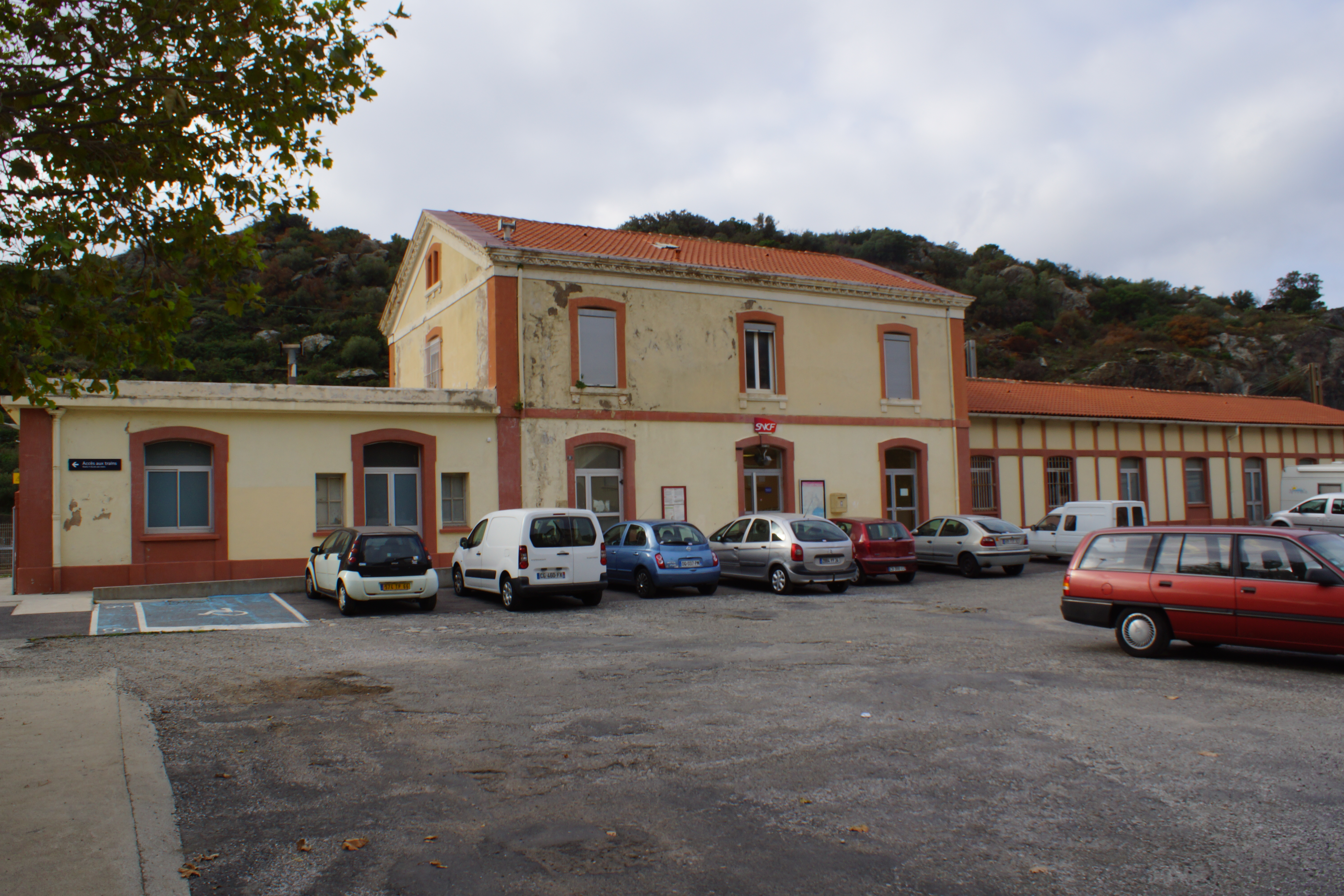 Gare de Port-Vendres-Ville : Bâtiment voyageurs et entrée de la gare.